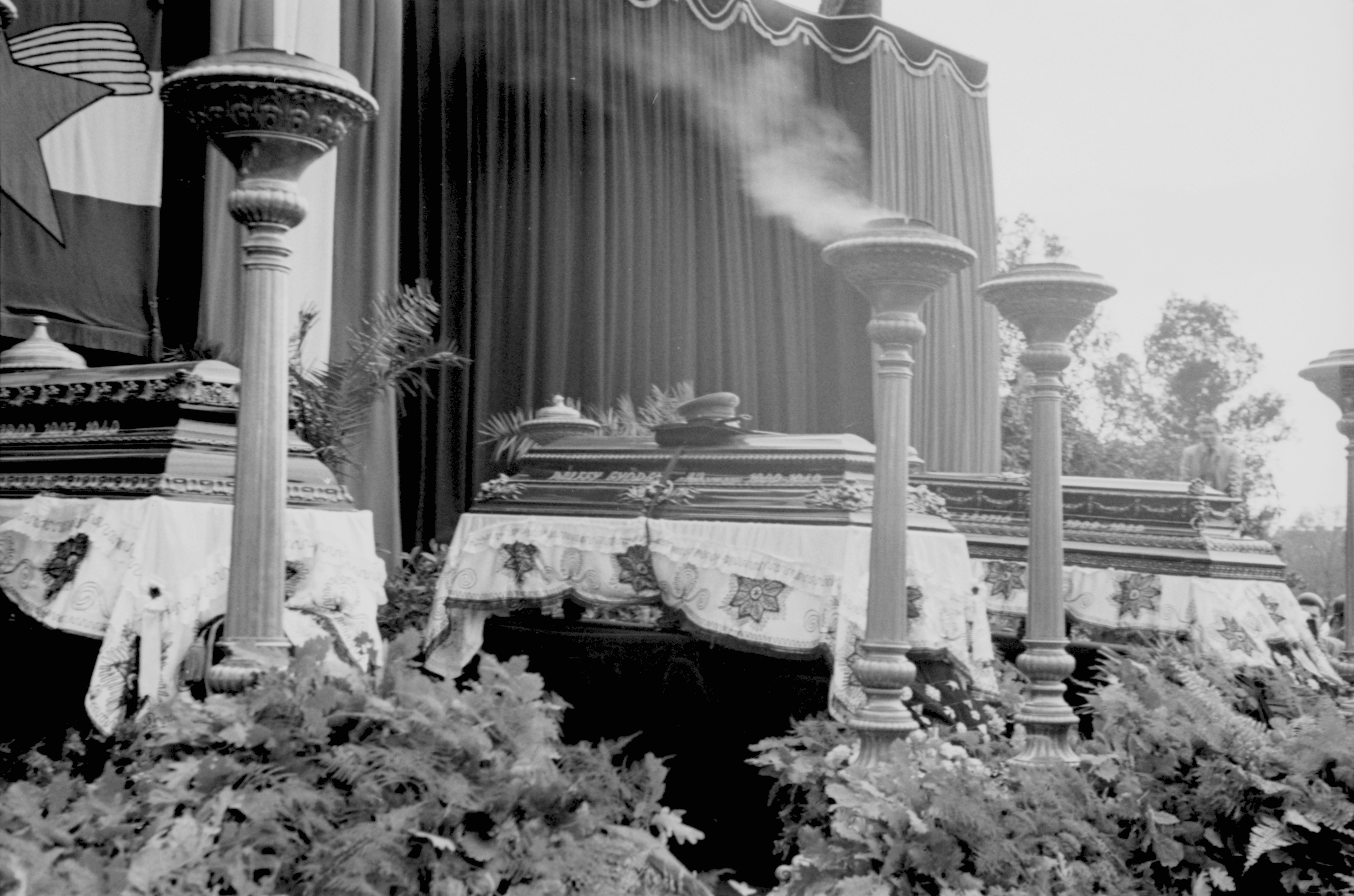 Fiumei úti Nemzeti Sírkert (Kerepesi temető). Rajk László, Pálffy György, Szőnyi Tibor és Szalai András ravatala újratemetésük alkalmával 1956. október 6-án. Location: Hungary, Budapest VIII. Tags: Budapest Title: Fiumei úti Nemzeti Sírkert (Kerepesi temető). Rajk László, Pálffy György, Szőnyi Tibor és Szalai András ravatala újratemetésük alkalmával 1956. október 6-án.